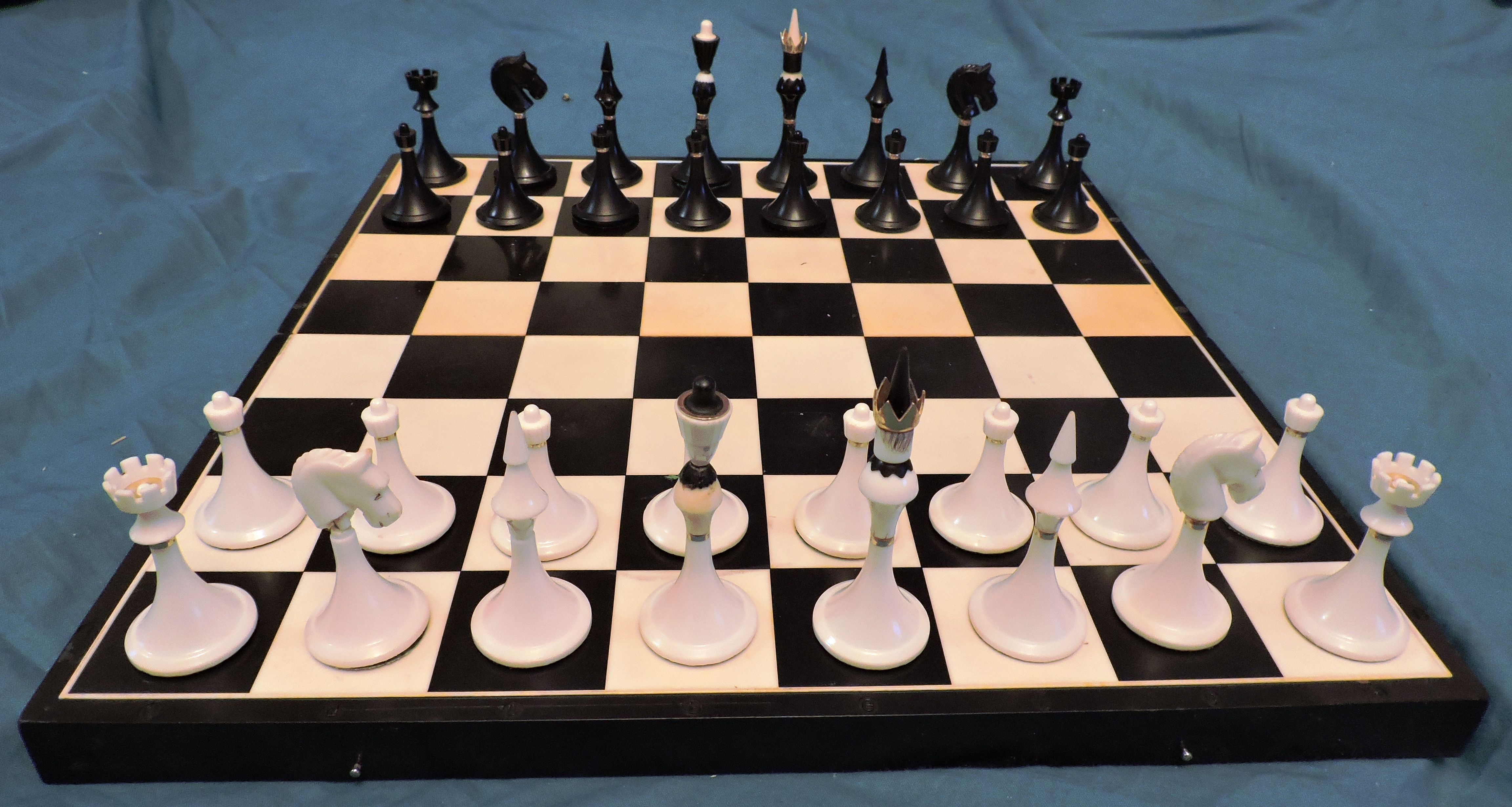 Пластиковые шахматы времён СССР